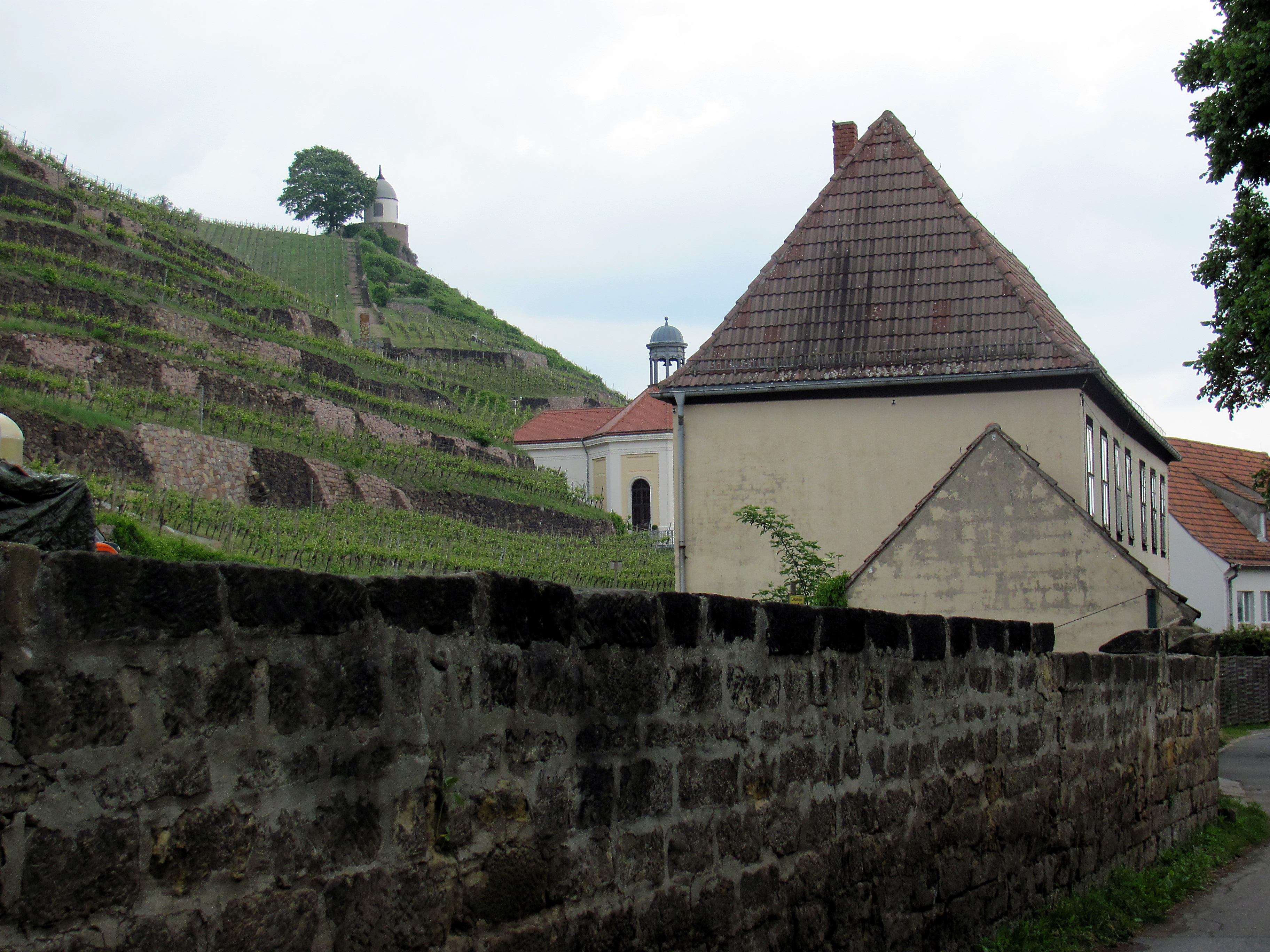 Radebeul, Traiteurhaus mit Weinbergen